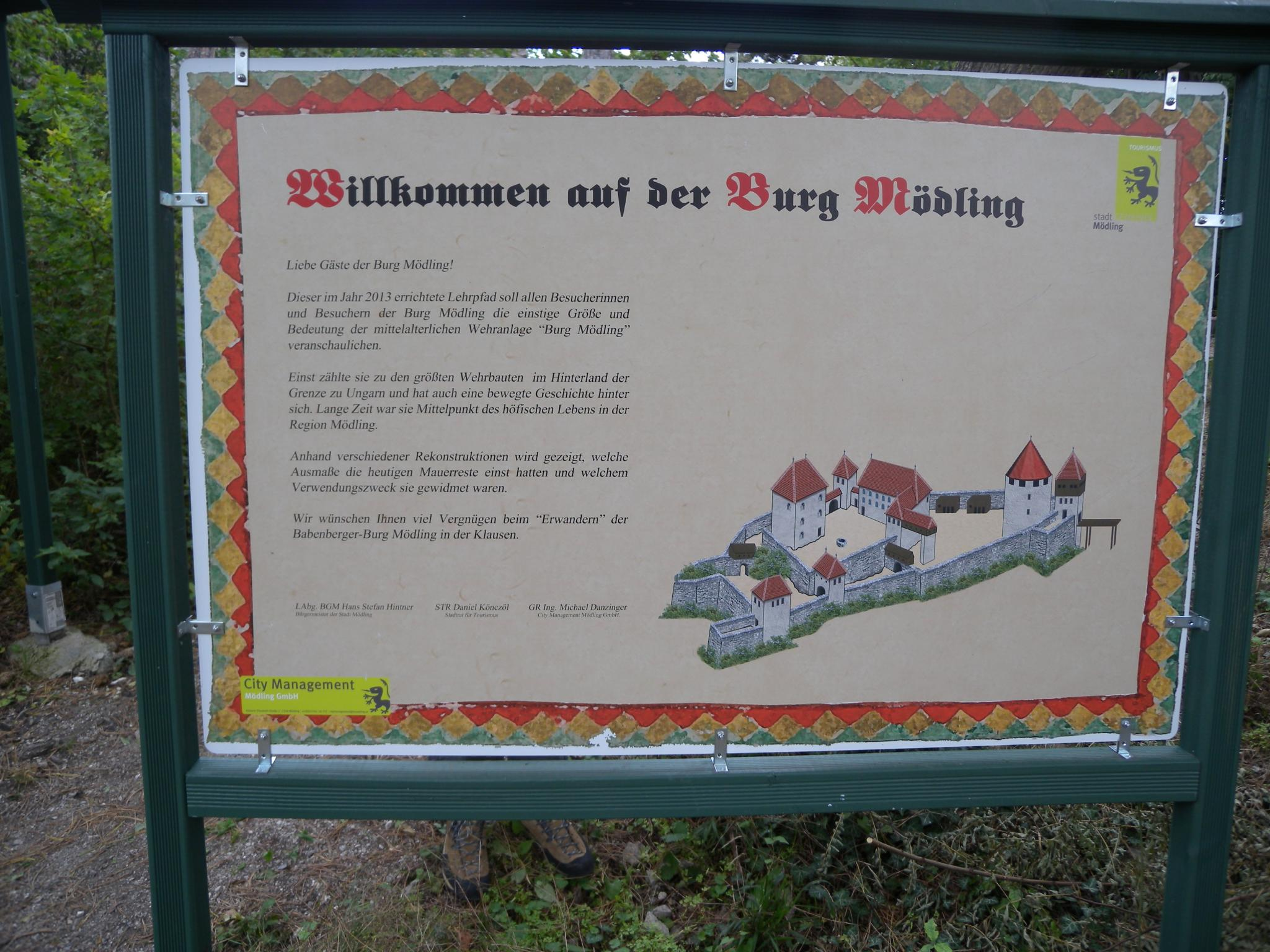 Burgruine Mödling